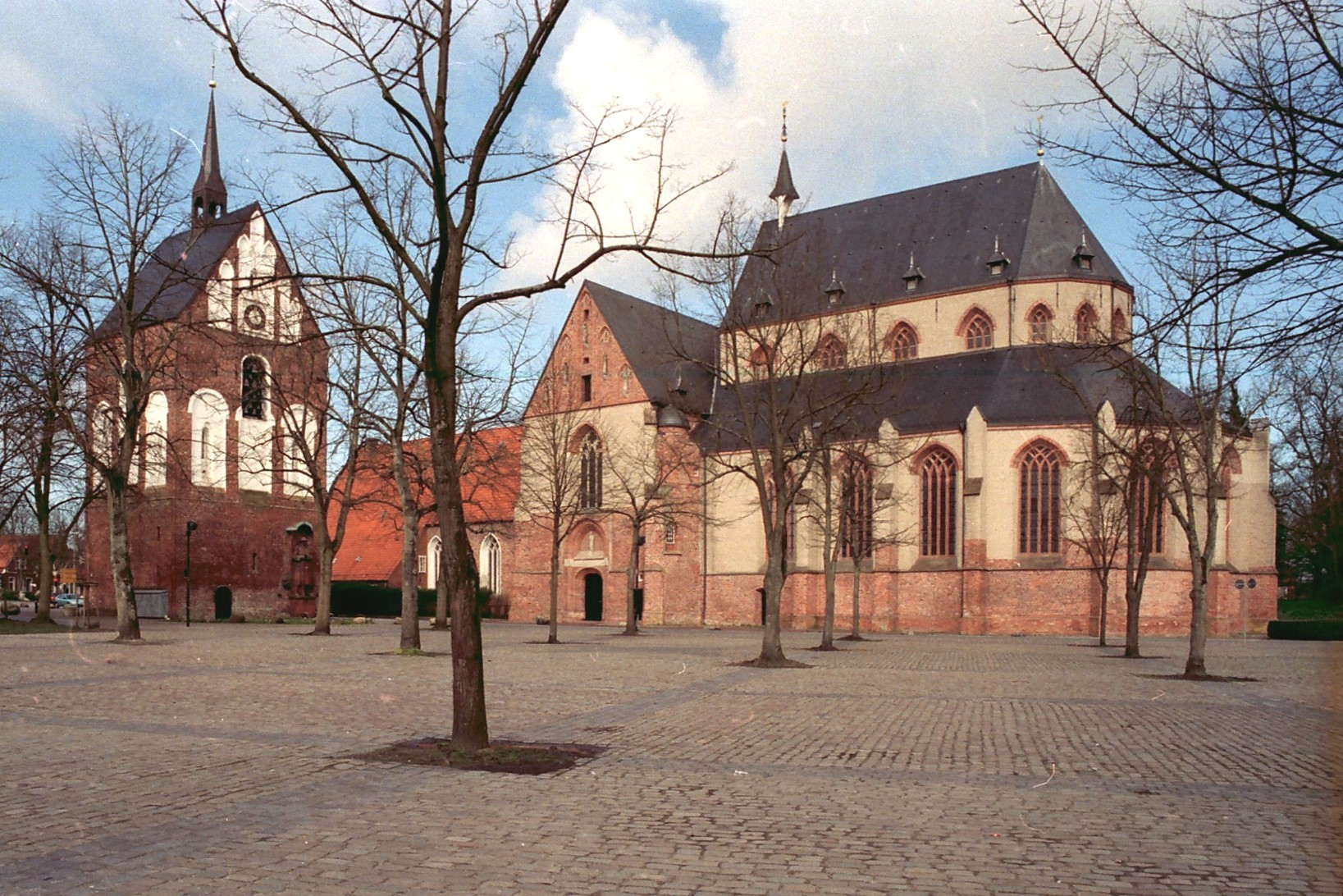 Ludgerikirche mit freistehendem Glockenturm